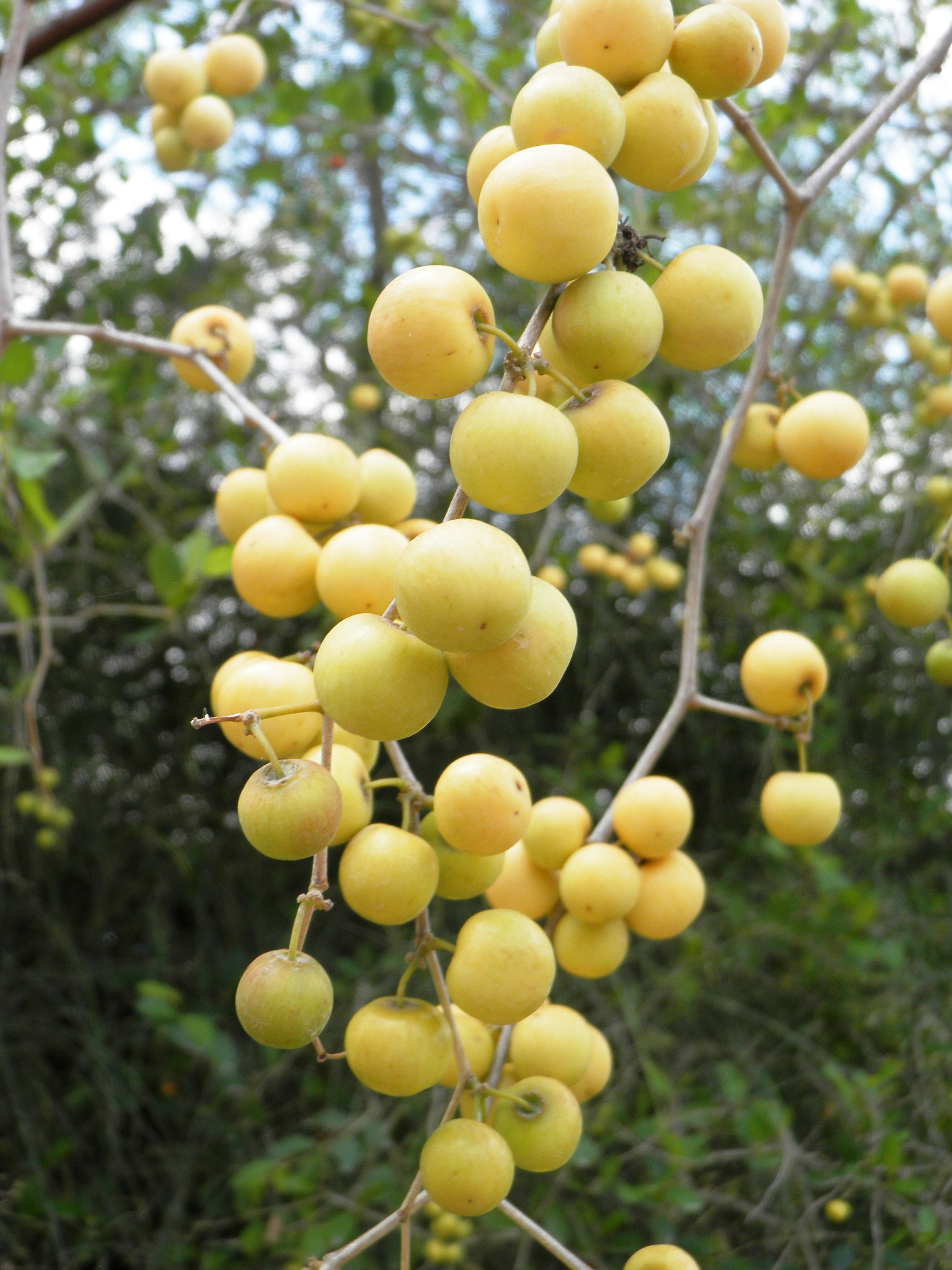 שיזף מצוי ביער מודיעין